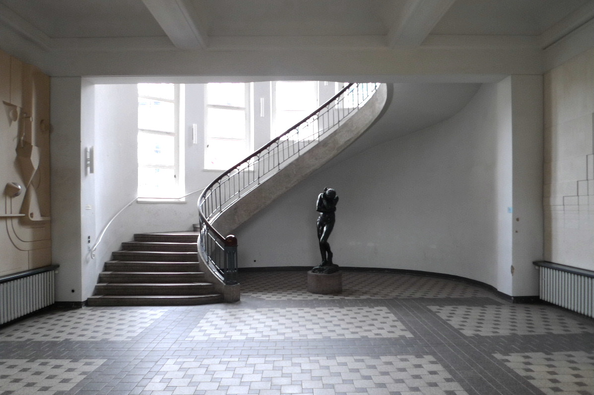 Eingangshalle des Hauptgebäudes der Bauhaus-Universität Weimar - im Zentrum, unterhalb der freischwingenden Jugendstiltreppe die von Auguste Rodin geschaffene „Eva“ (1888)